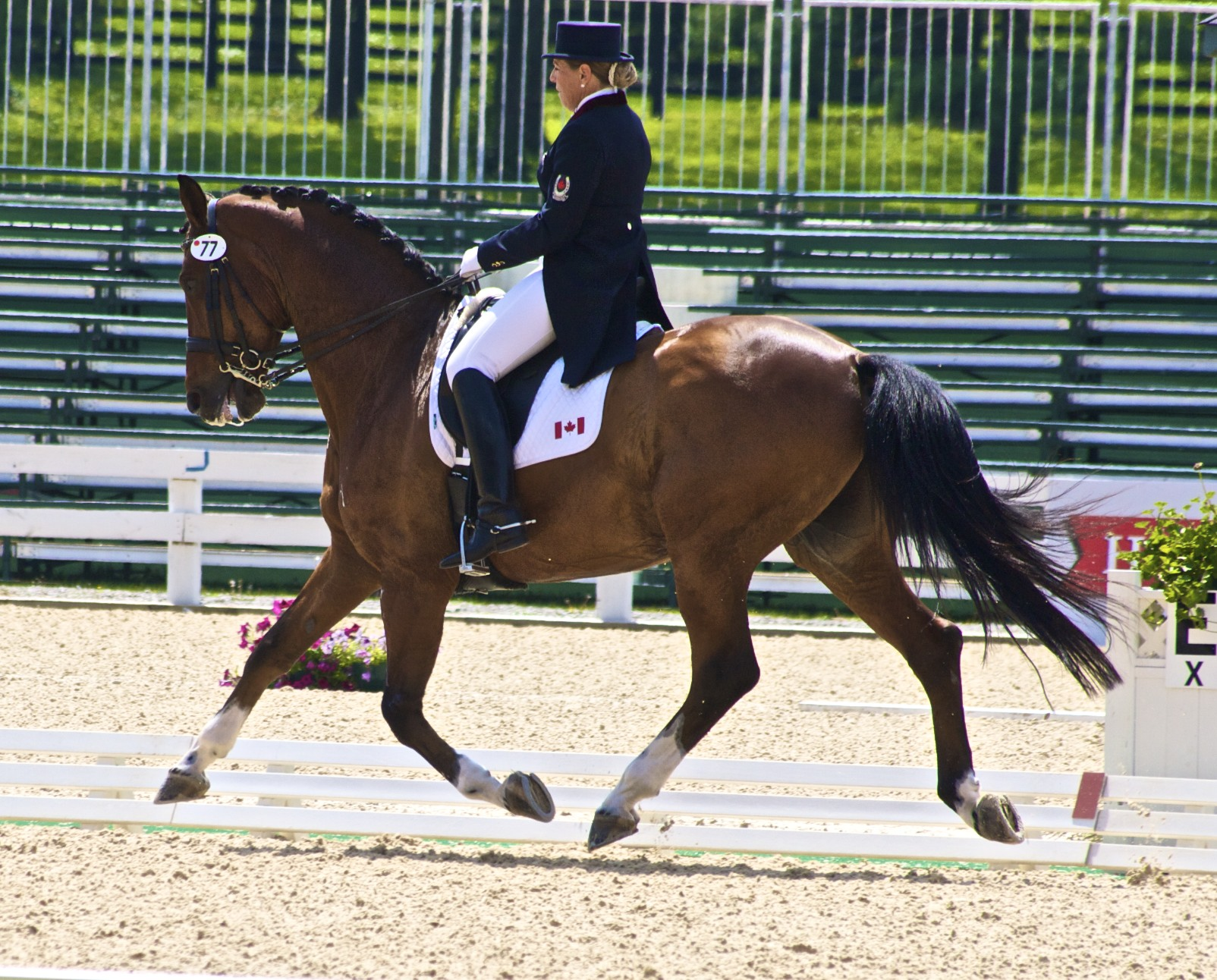 Pikardi (Canadian warmblood Gelding) & Bonny Bonnello